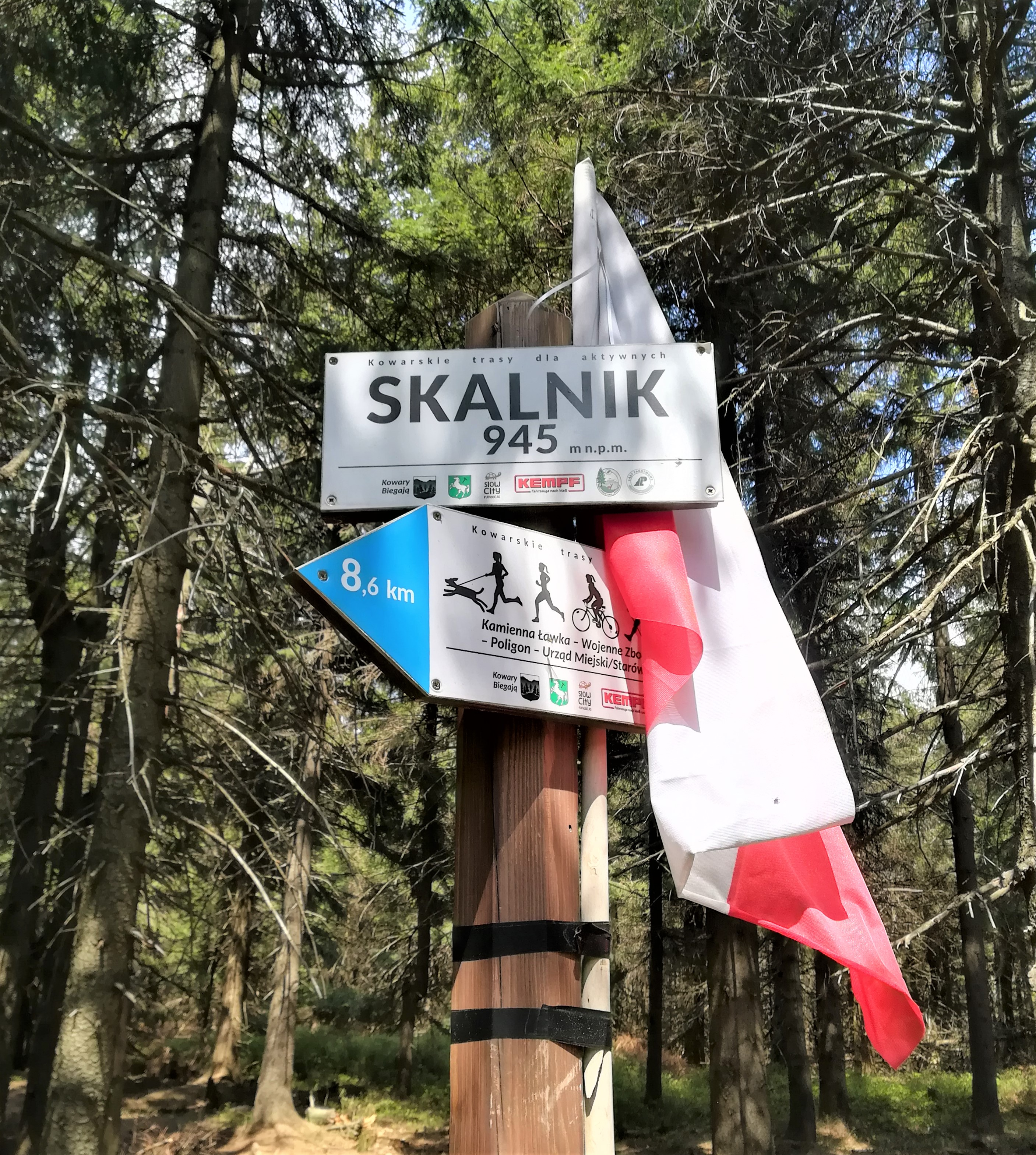 Szczyt Skalnika w Rudawach Janowickich.